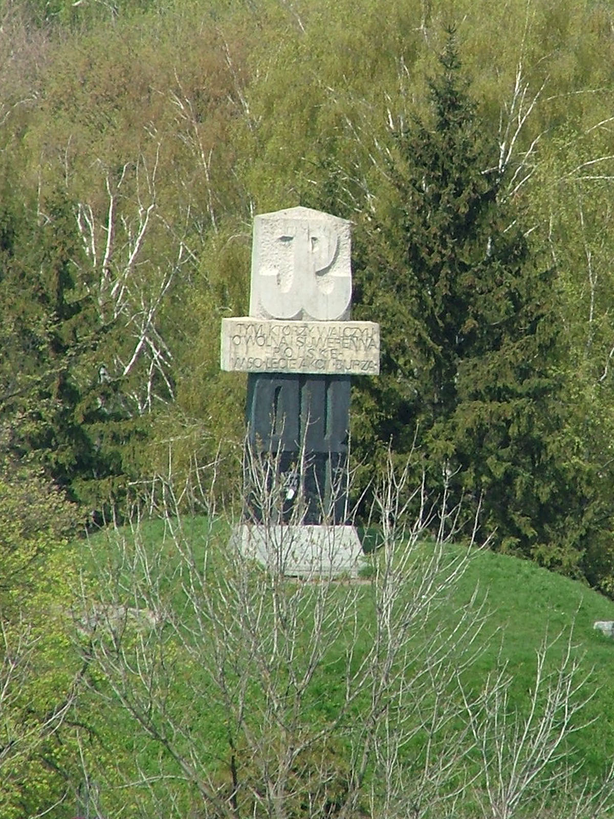 Chełm, Park Miejski - pomnik Akcji "Burza" AK